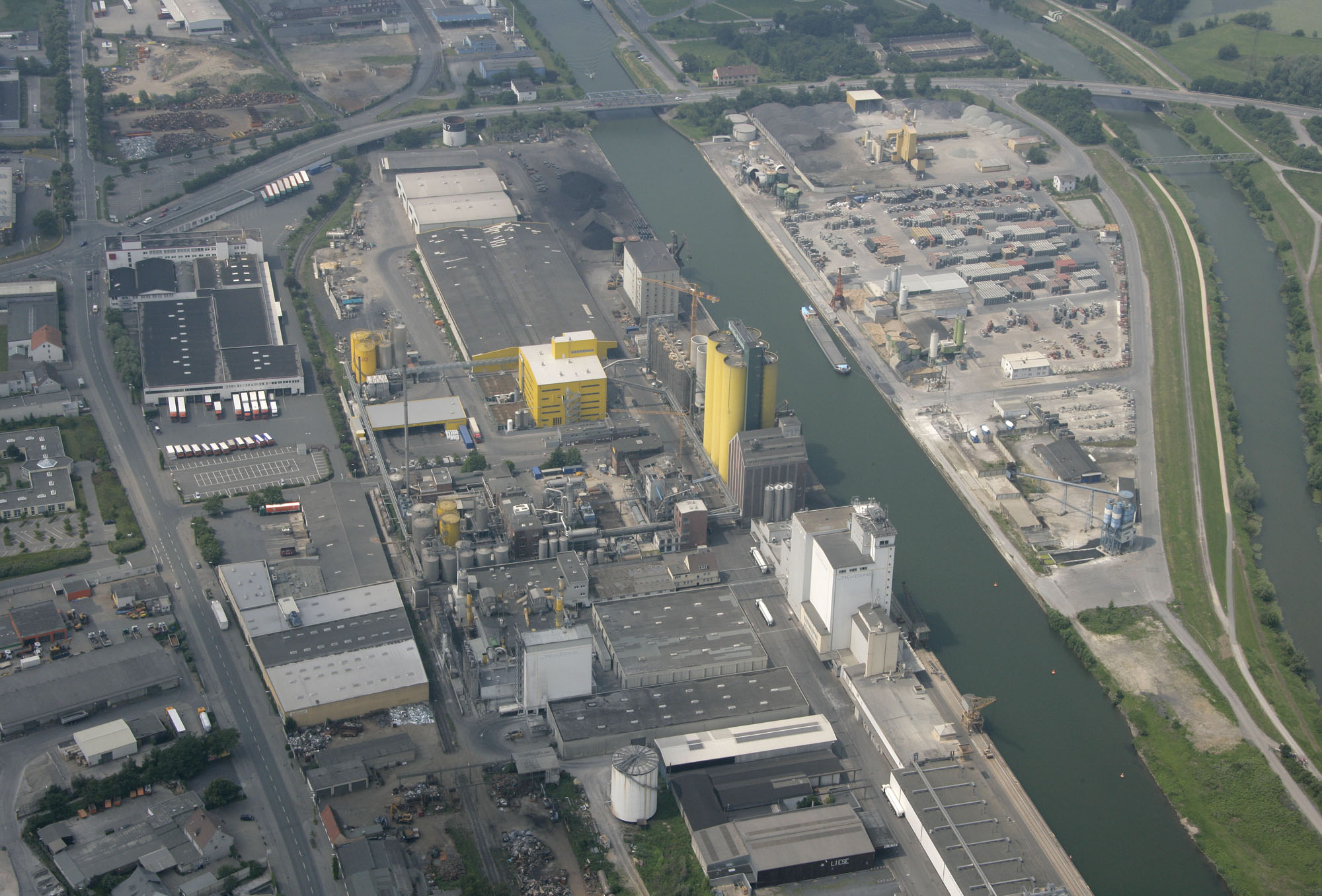 Luftbildaufnahme Hamm